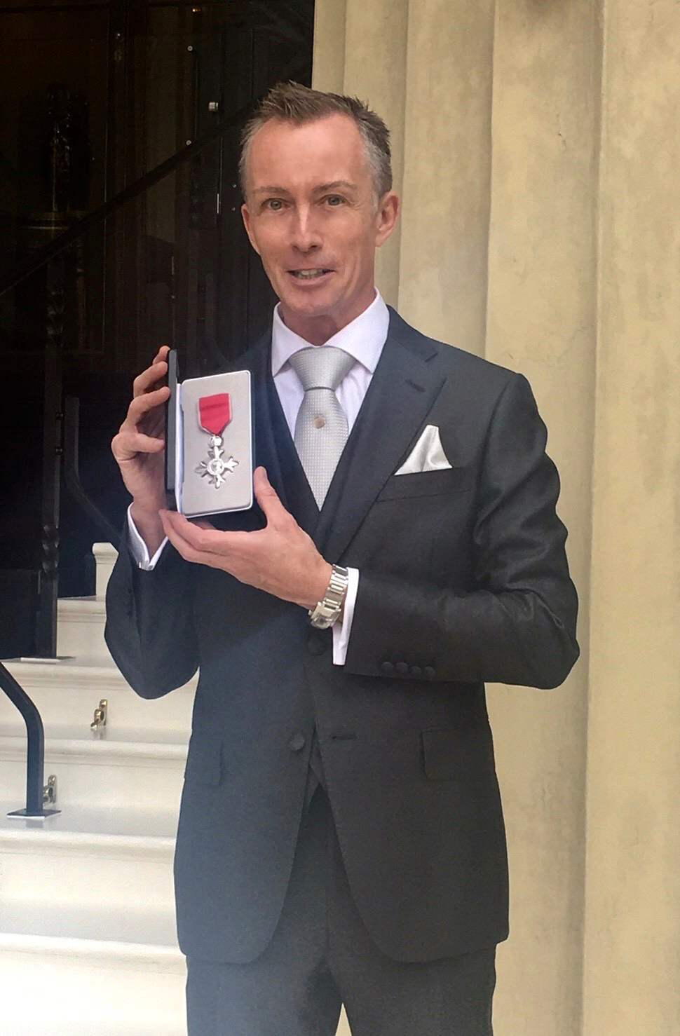 2017年6月にバッキンガム宮殿で行われたMBE受勲式にて